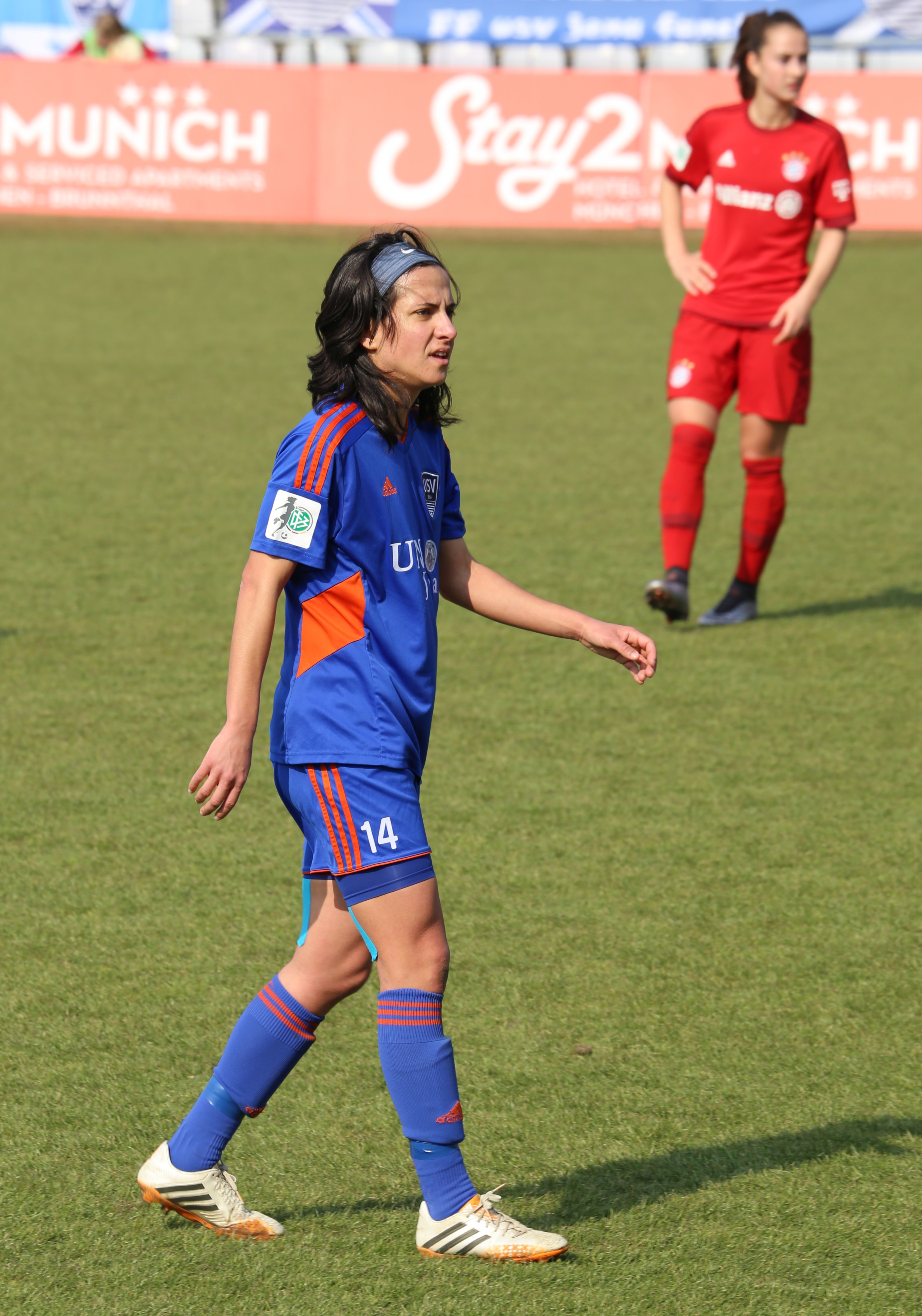 Dolores Silva (FF USV Jena) beim Frauen-Bundesliga-Spiel FC Bayern München gegen FF USV Jena am 19. März 2016 im Stadion an der Grünwalder Straße (Ergebnis war 5:1).